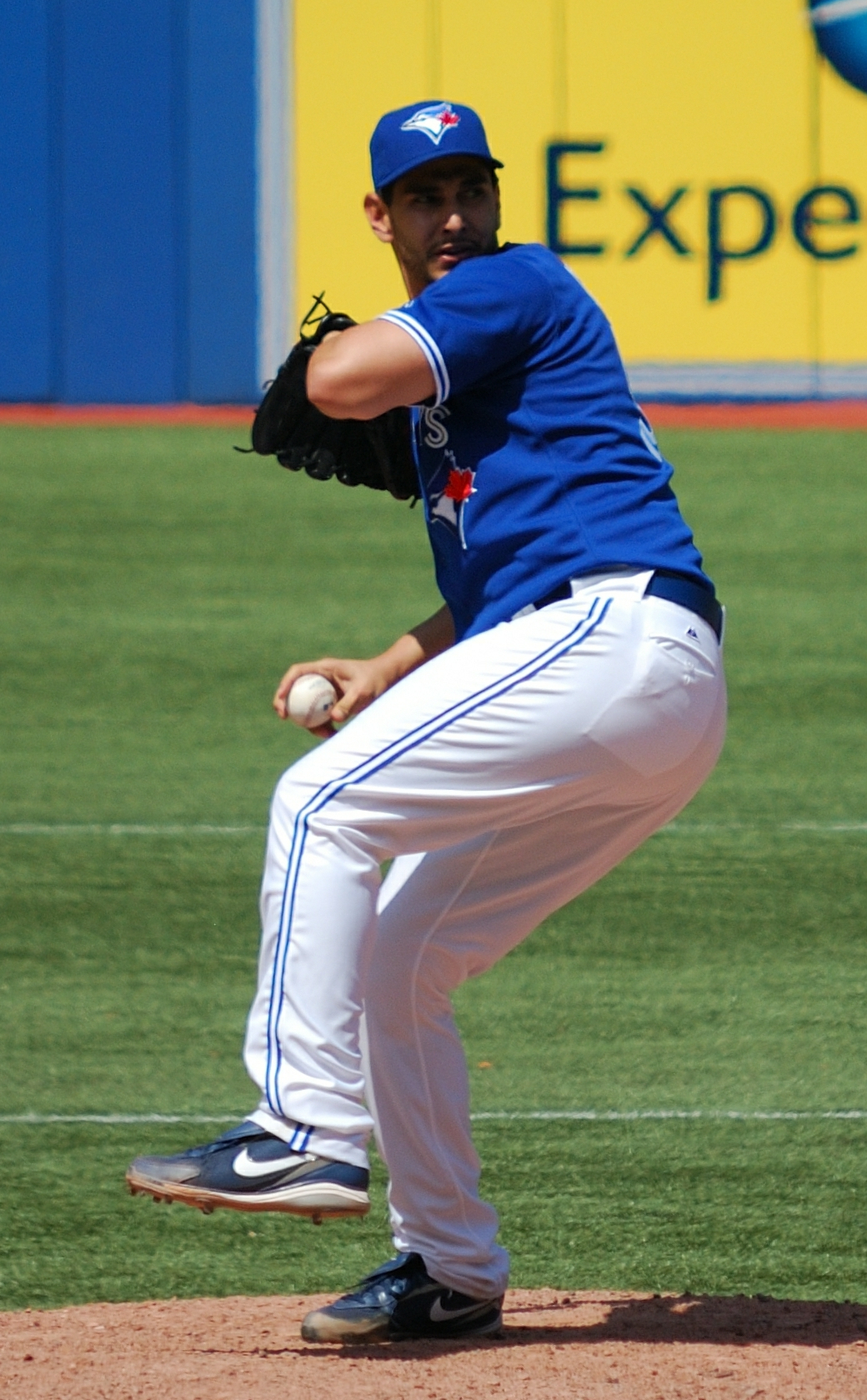 Robert Coello